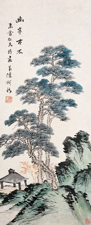 中文（香港）: 陳師曾《幽亭古木》